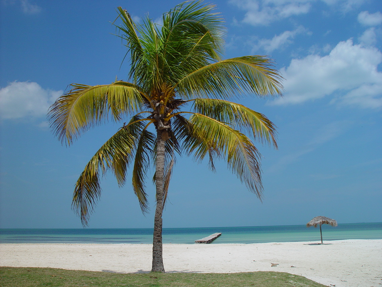 Cocos nucifera